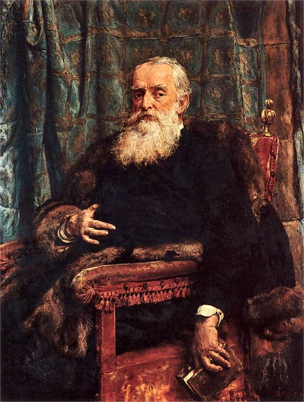 Portret Henryka Krajewskiego (1892). Olej na płótnie. 125 x 93 cm, autor Jan Matejko, Muzeum Narodowe, Warszawa.